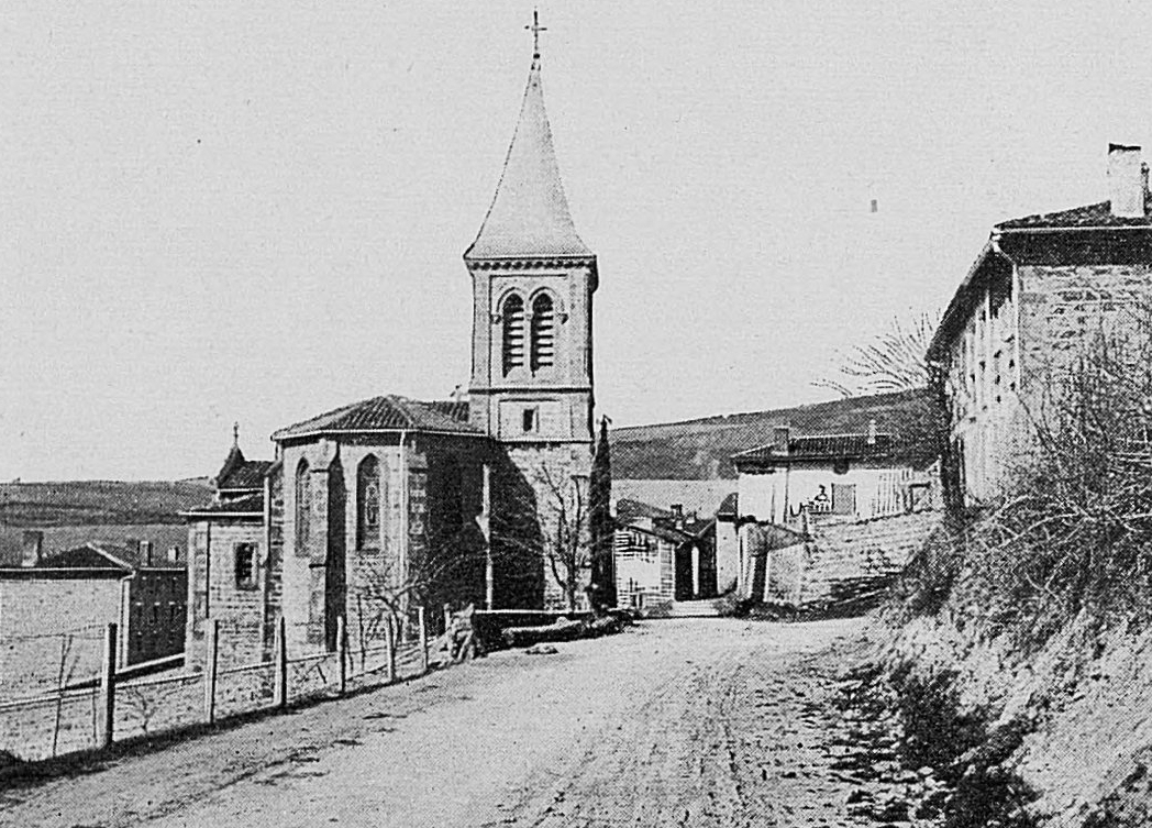 Dictionnaire illustré des communes du département du Rhône. Tome 1 / par MM. E. de Rolland et D. Clouzet.